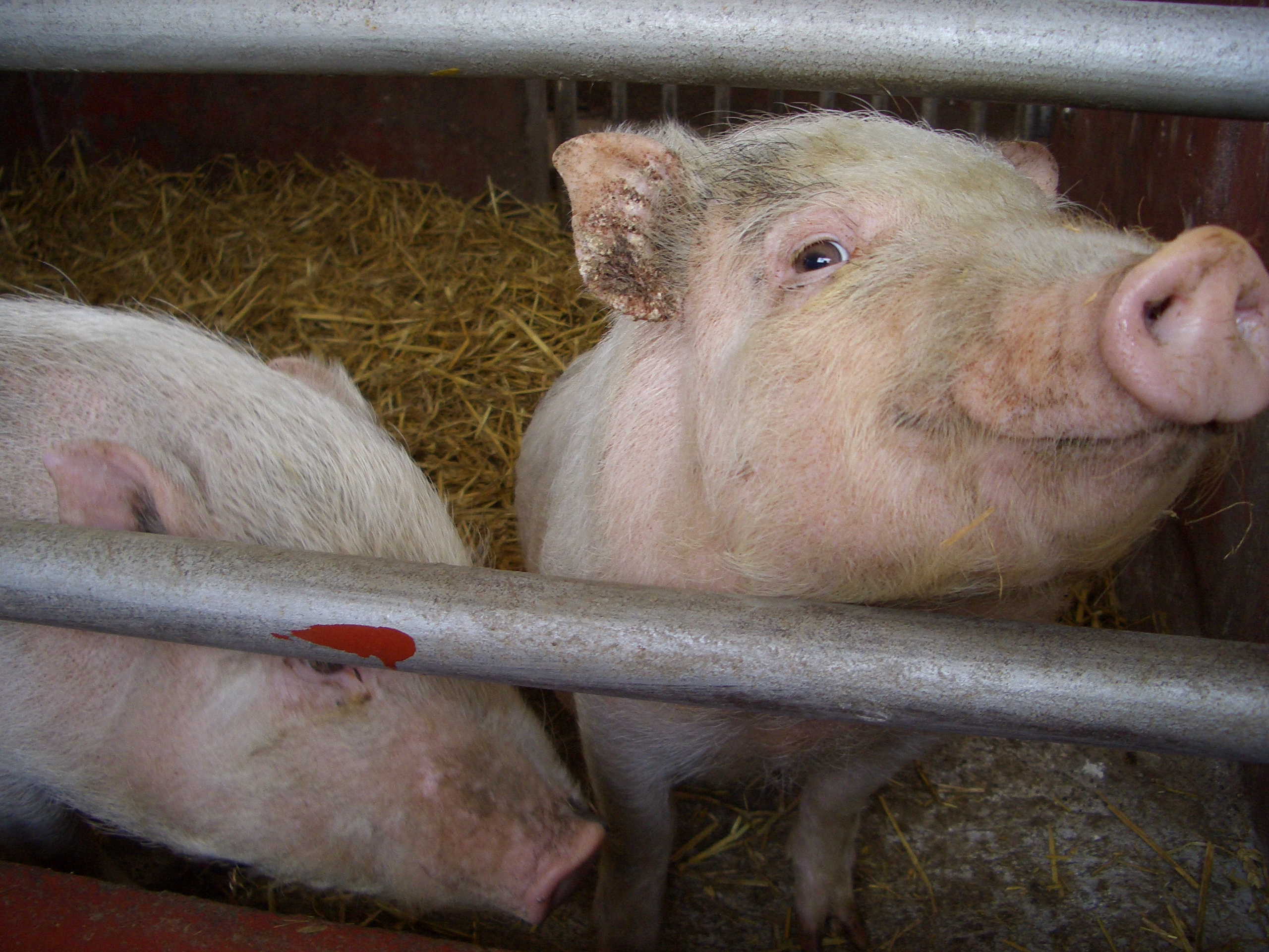 2 pigs.